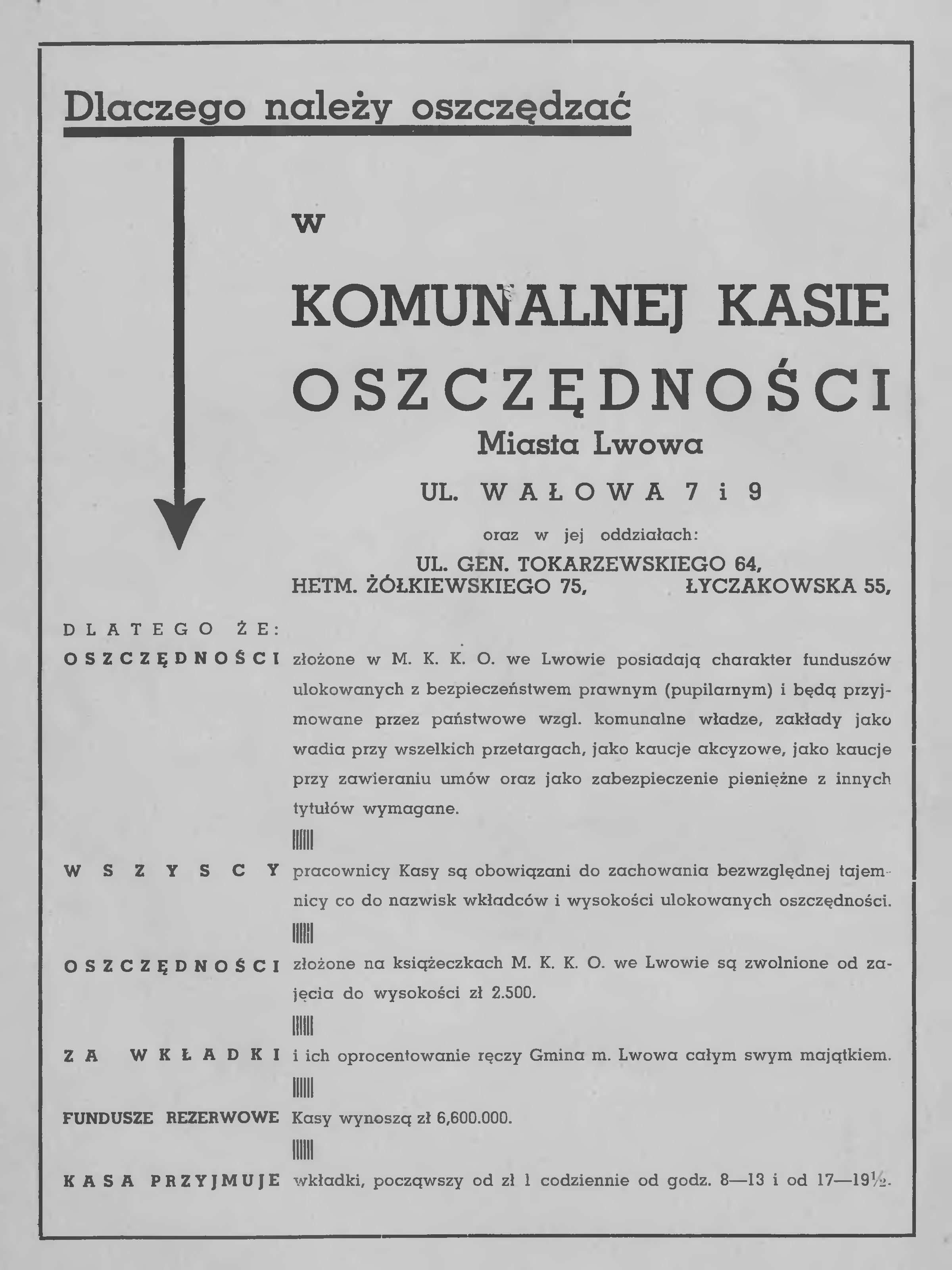 Реклама Комунальної ощадної каси у львівському довіднику. 1939 рік.